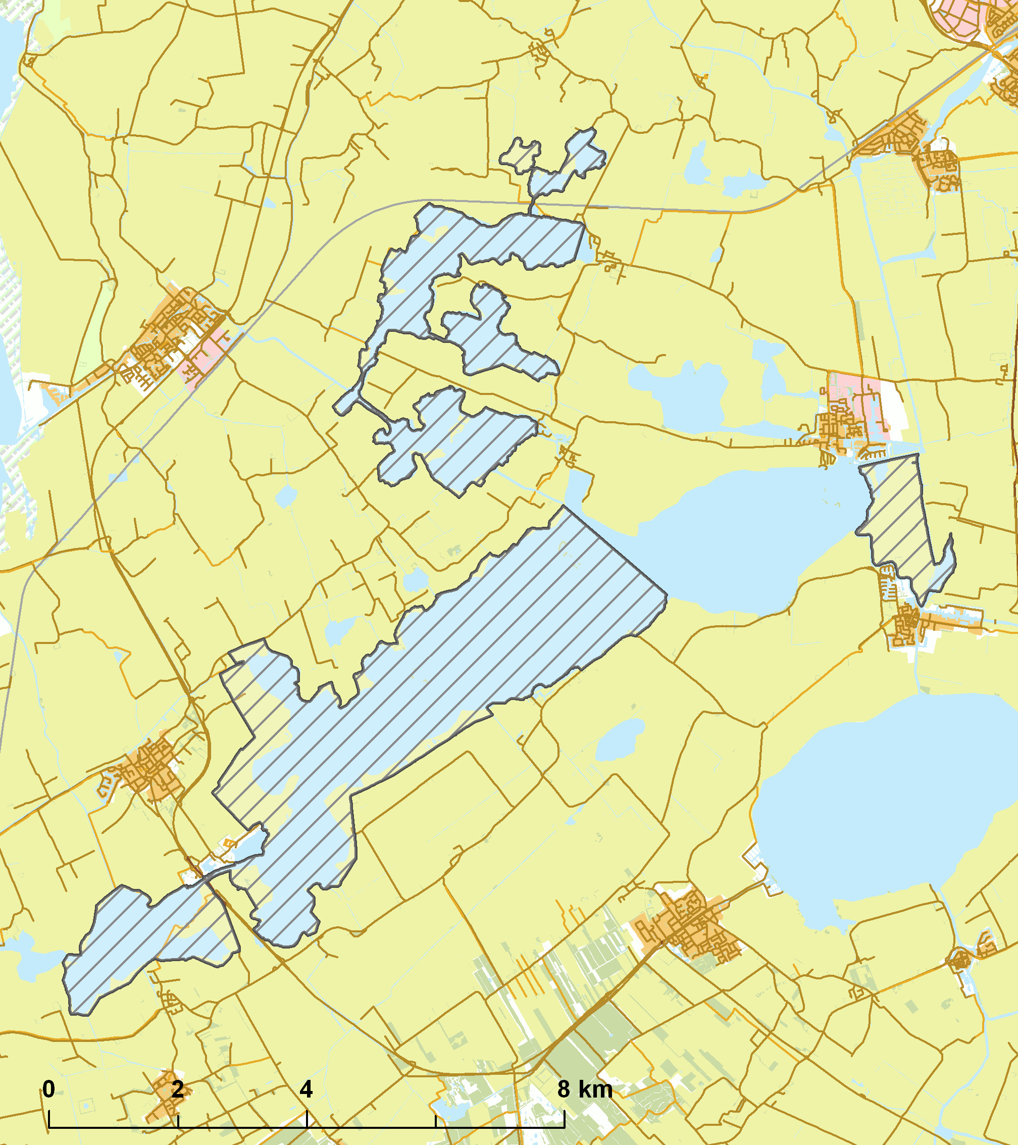 Natura2000 - Oudegaasterbrekken, Fluessen en omgeving.png